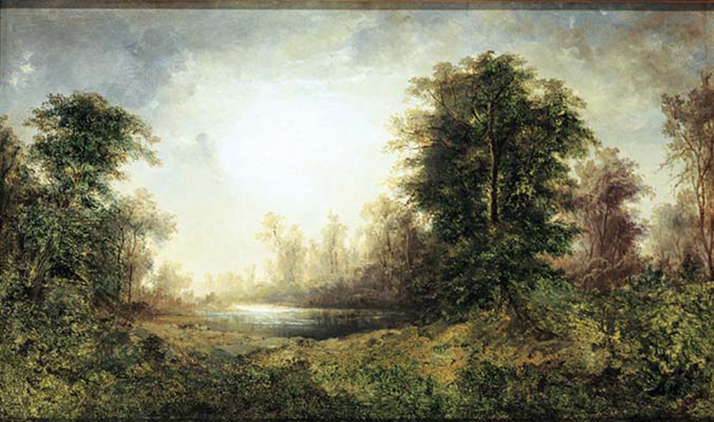 paisaje por antonio smith